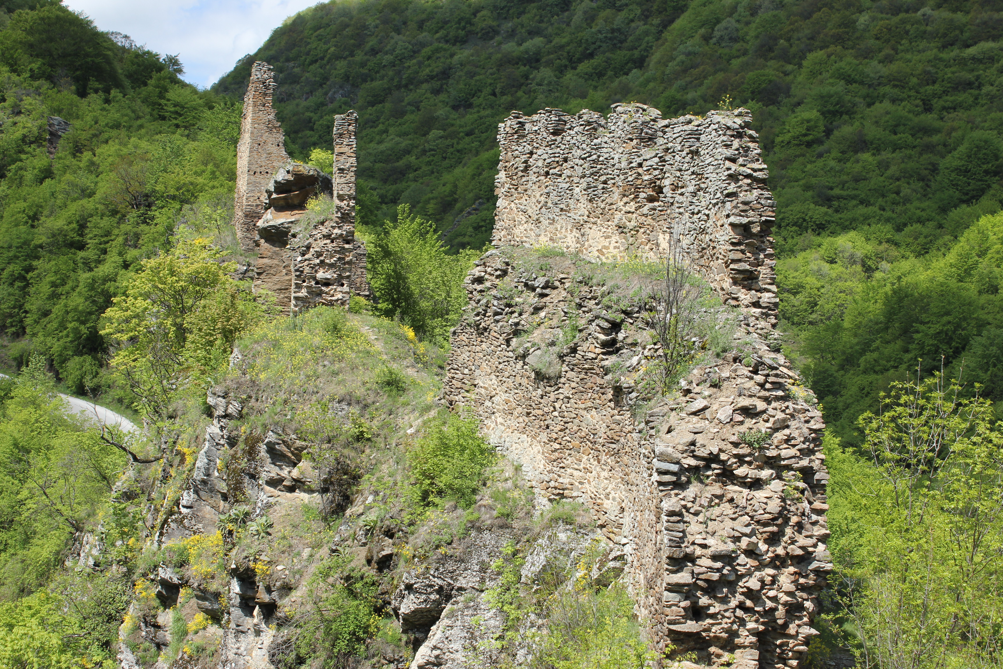 Част от източната стена на крепостта Марково кале, Враня, Сърбия.